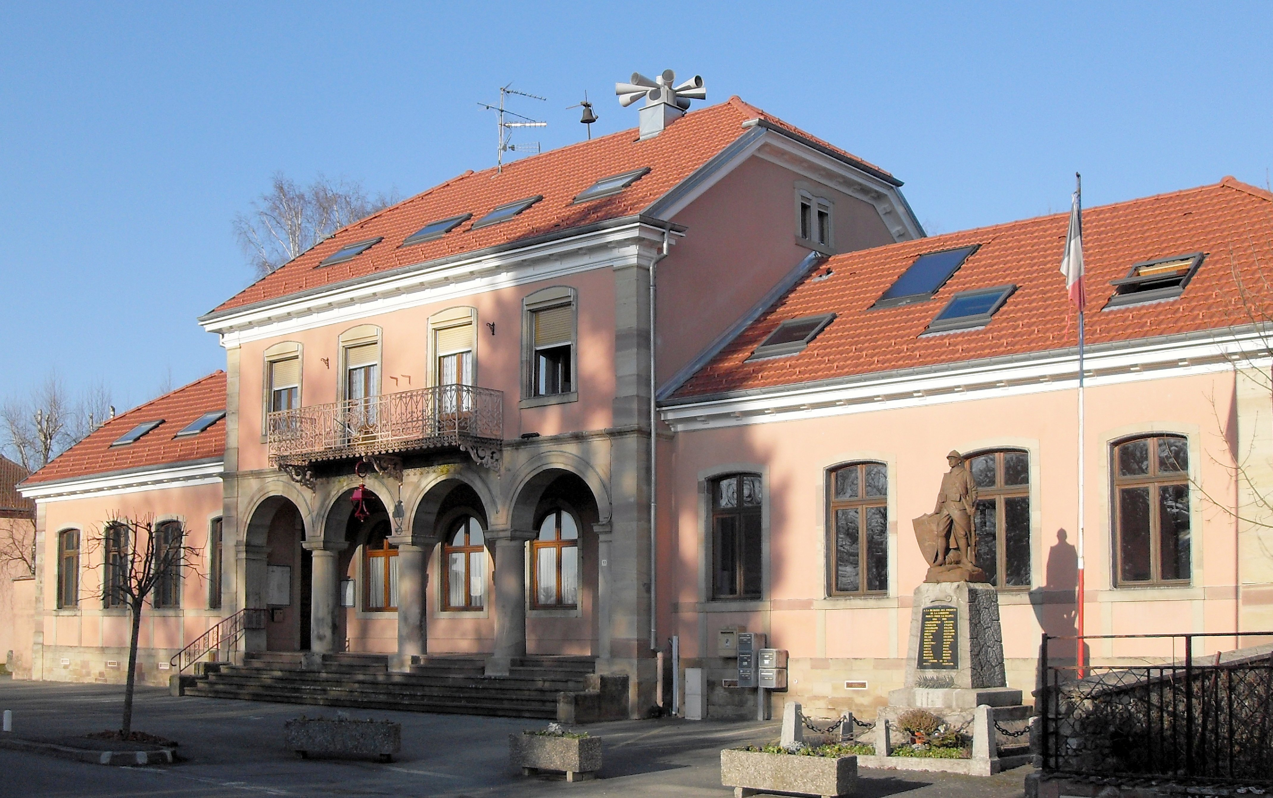 La mairie de Foussemagne